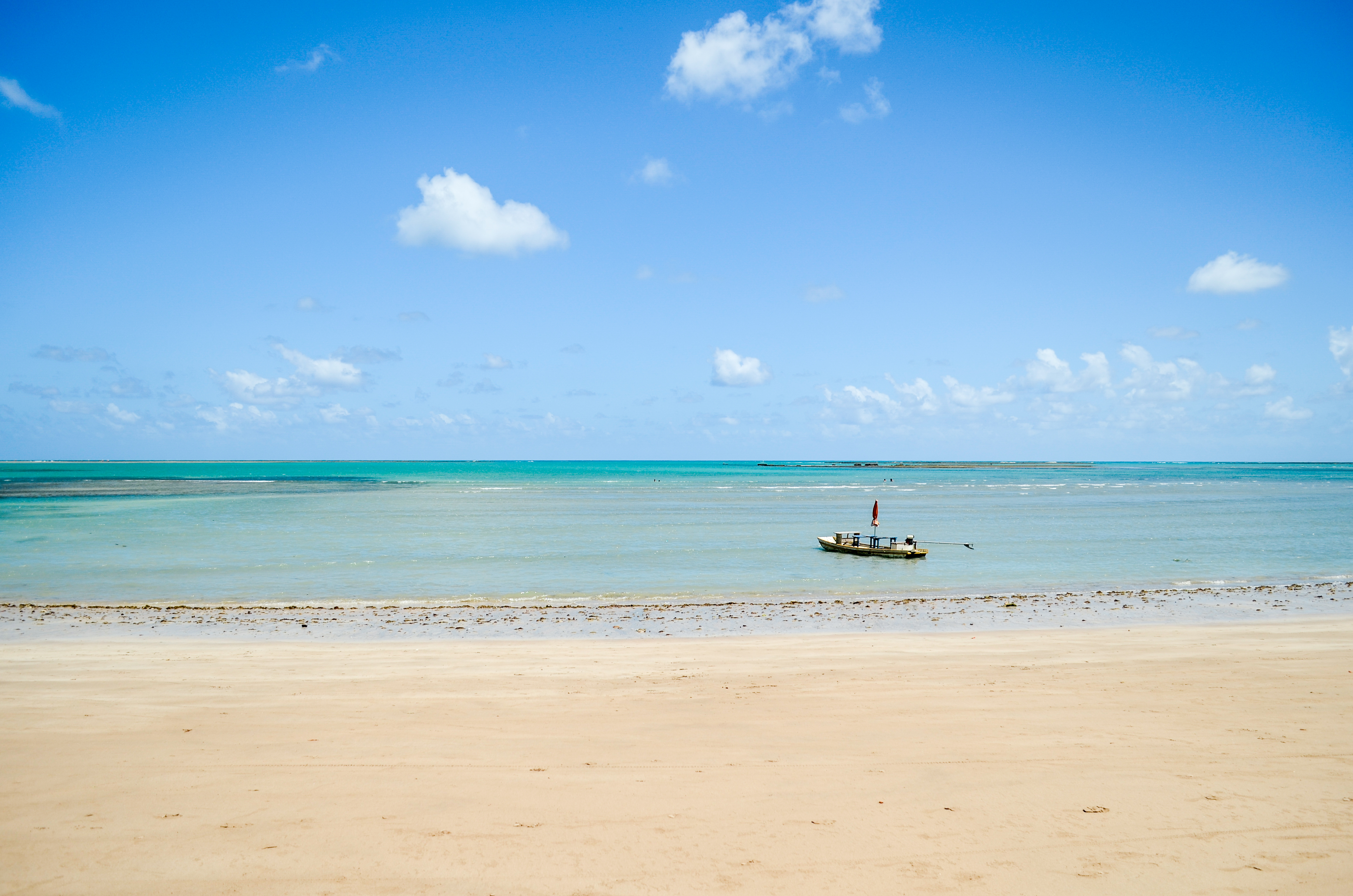 São Miguel dos Milagres.